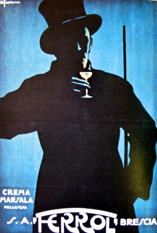 Manifesto Marsala Polisseni delle distillerie Ferrol (AS Brescia, Fondo Miscellanea Bs, op. n.n., 1925)